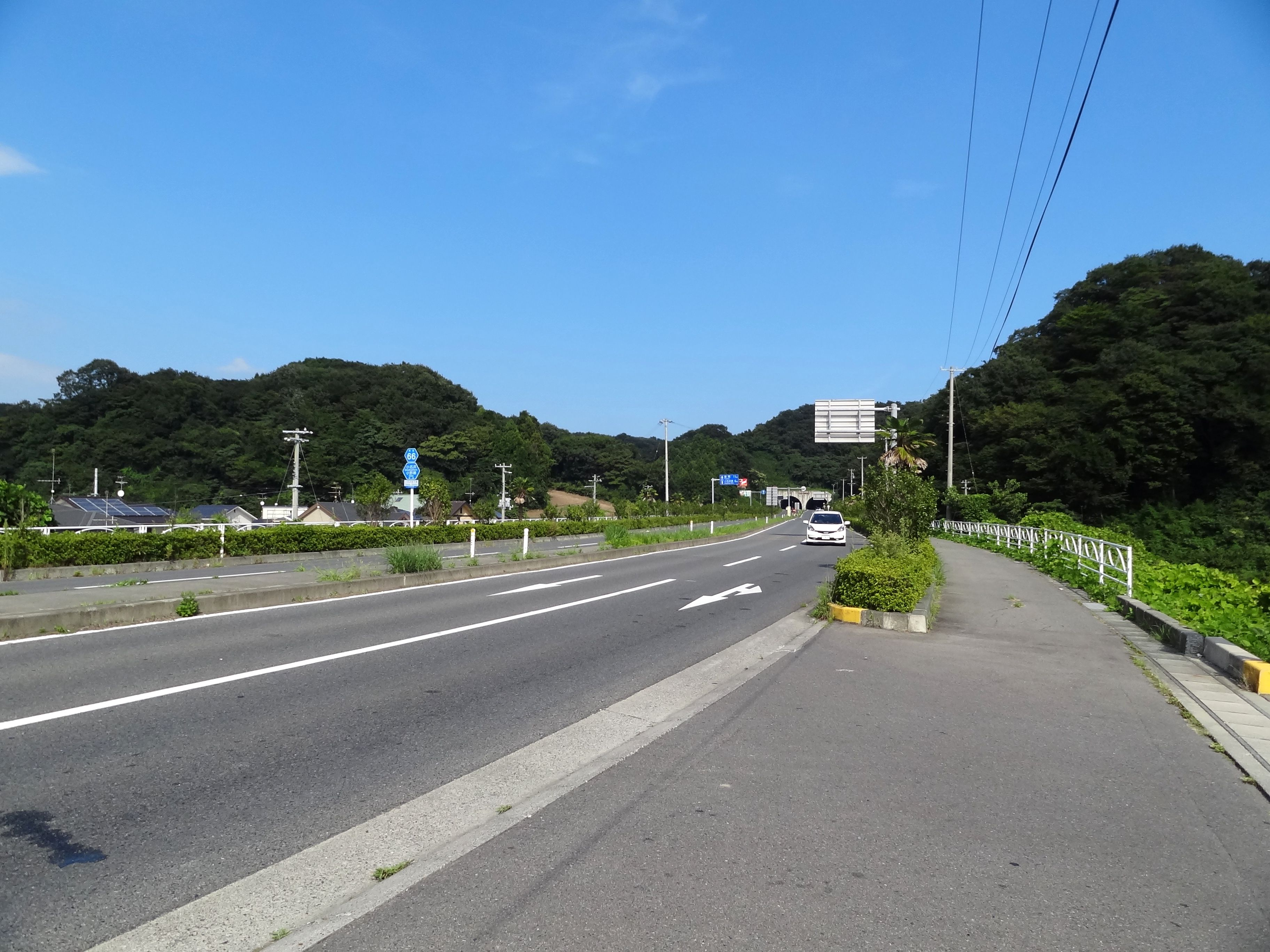 福島県道66号小名浜小野線 いわき市小名浜相子島付近